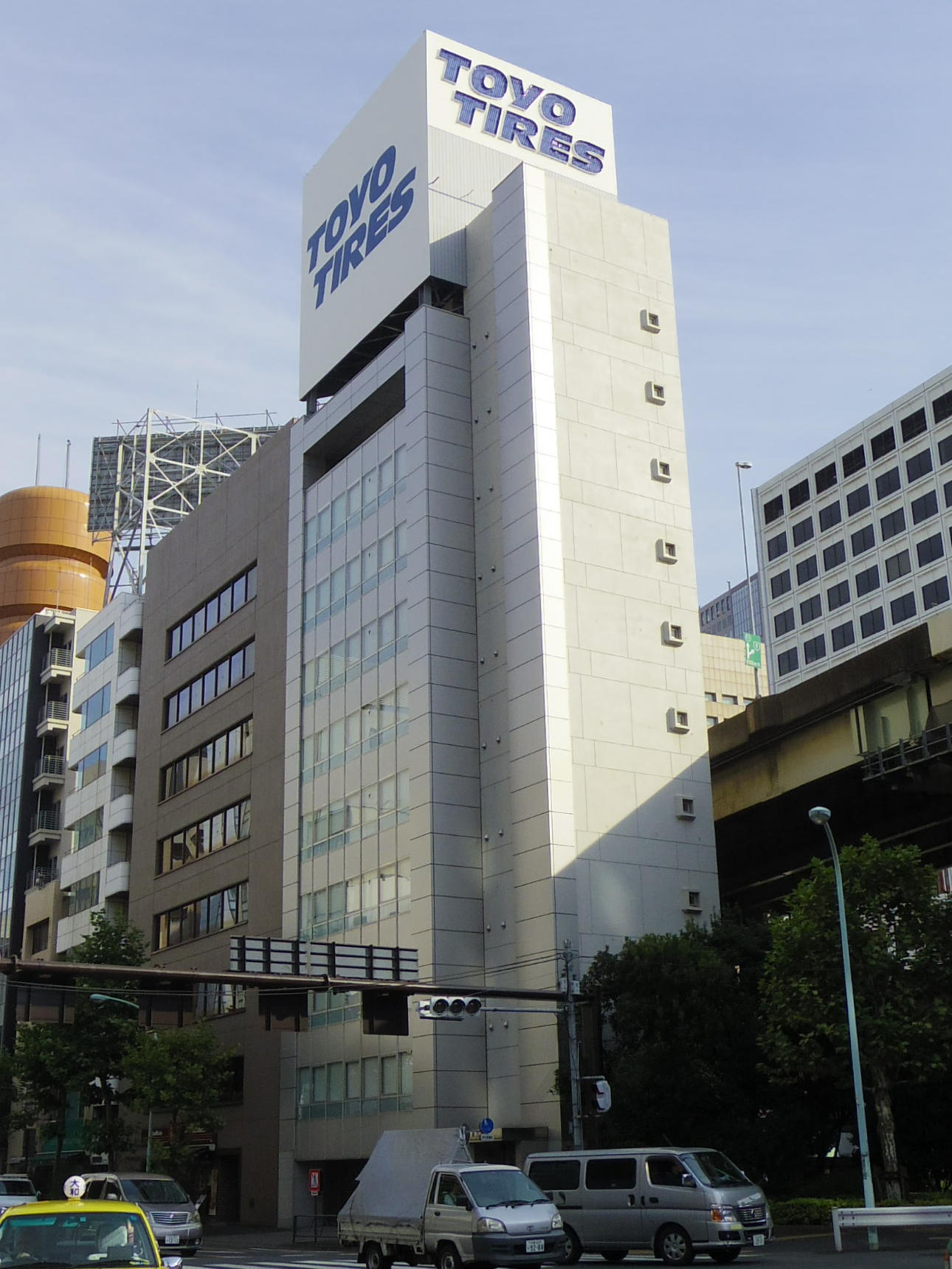 東洋ゴム工業（TOYO TIRE）東京支店（東京都千代田区岩本町）。